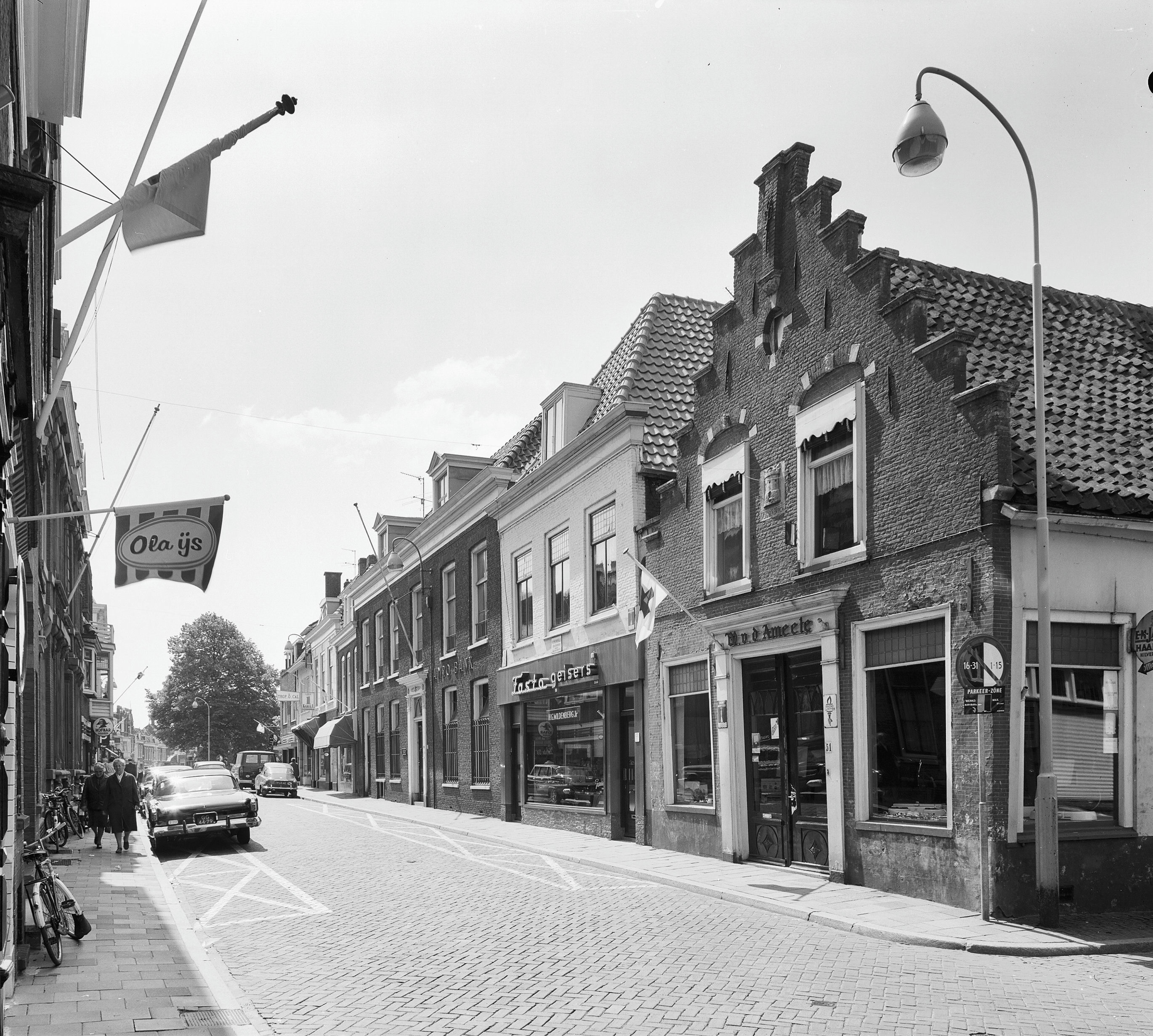 voor- en zijgevel